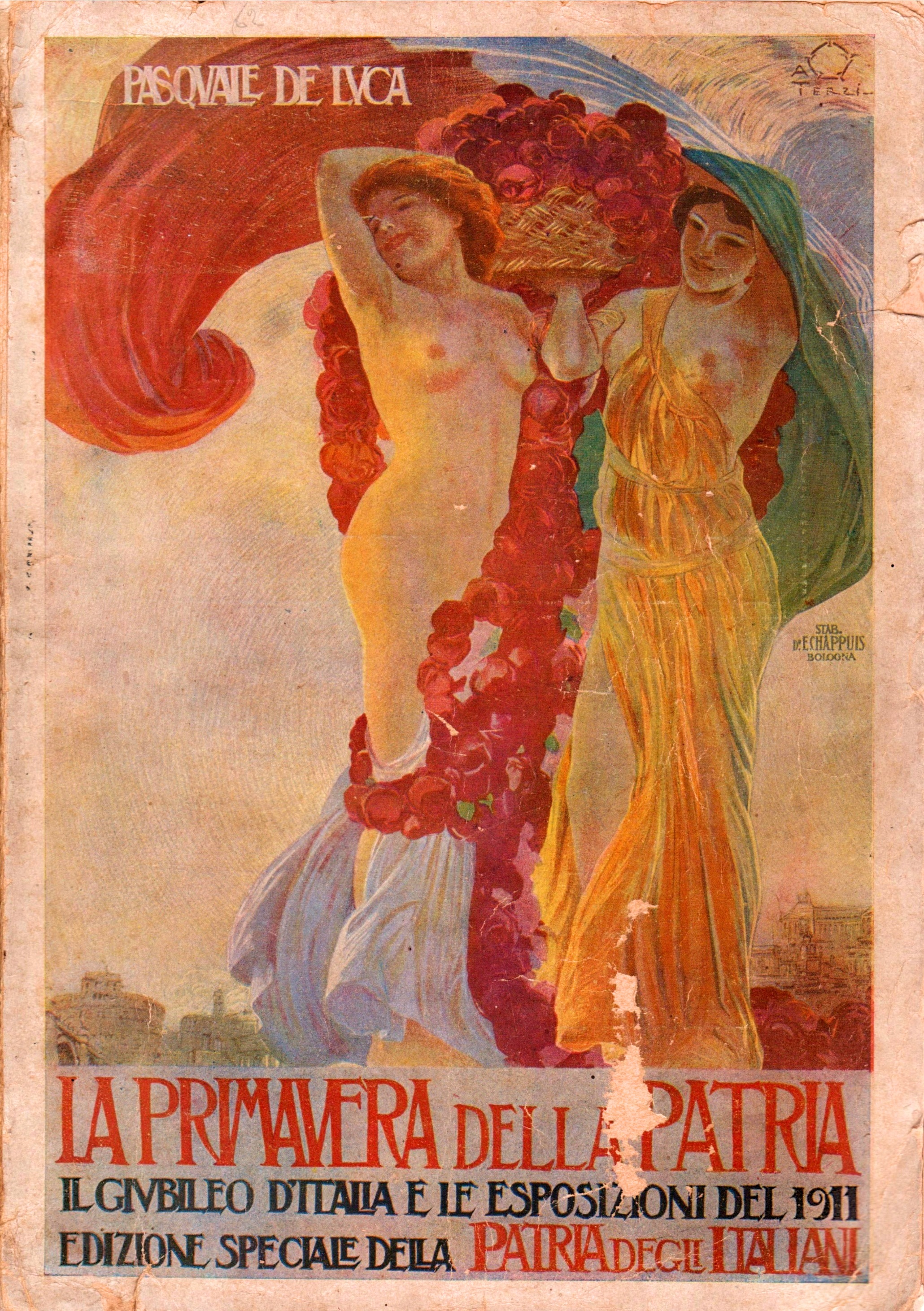 Copertina illustrata da "La primavera della patria. Il giubileo d'Italia e le esposizioni del 1911. Edizione speciale del giornale La patria degli Italiani di Buenos Aires".